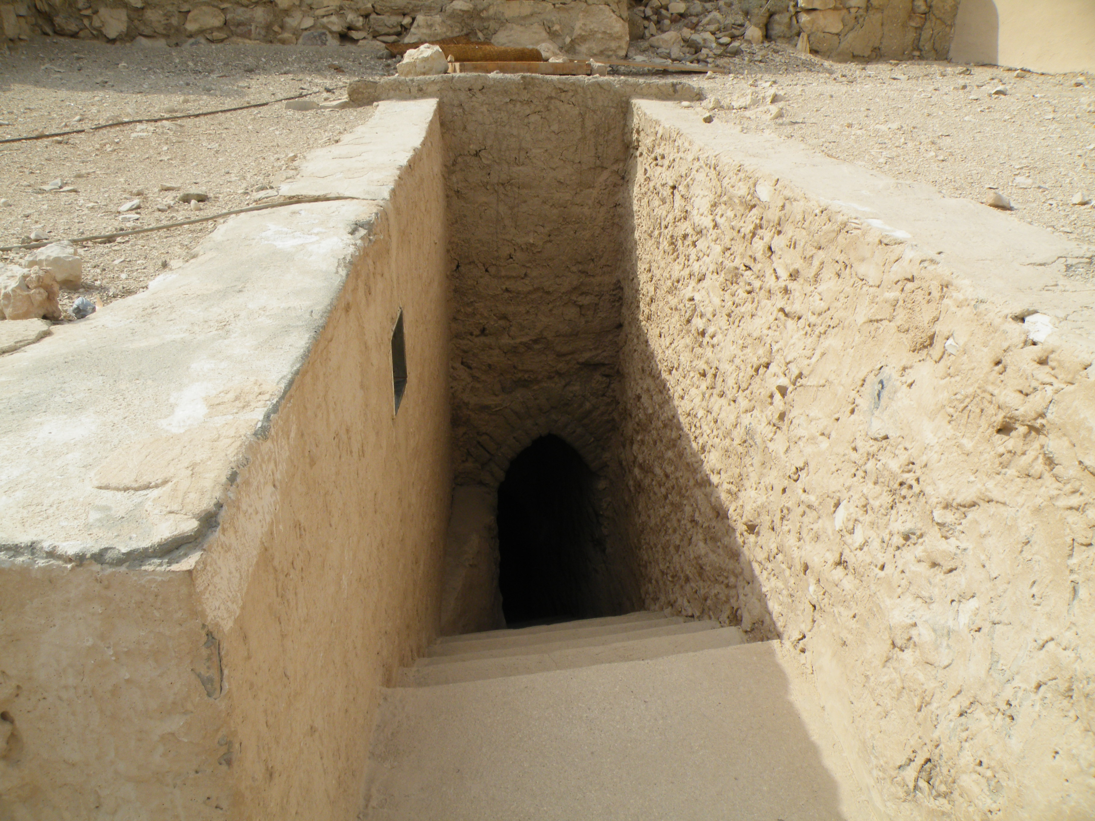 TT3, Pasedu sírjának lejárata (Dejr-el-Medina, Luxor, Egyiptom)